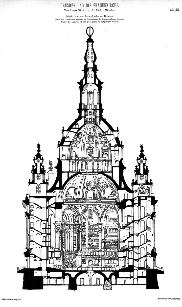 Schnitt von der Frauenkirche zu Dresden